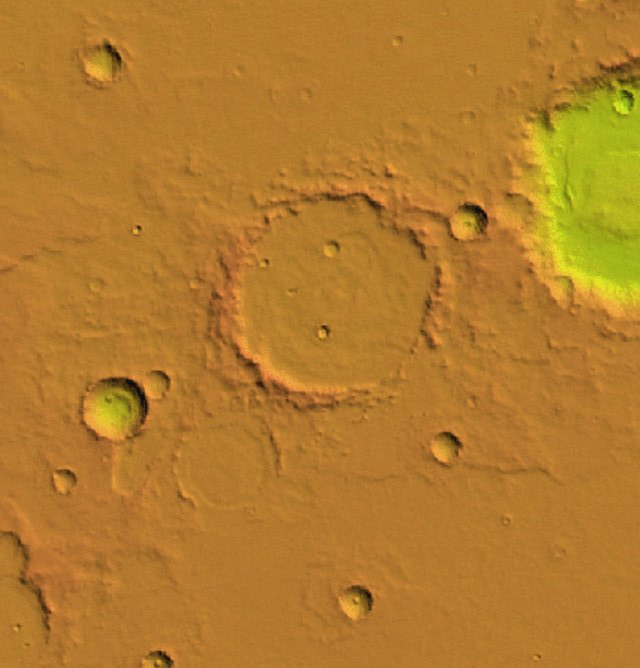 Cráter marciano Heaviside. (Imagen IAU/USGS/Goddard/A SU/USGS)